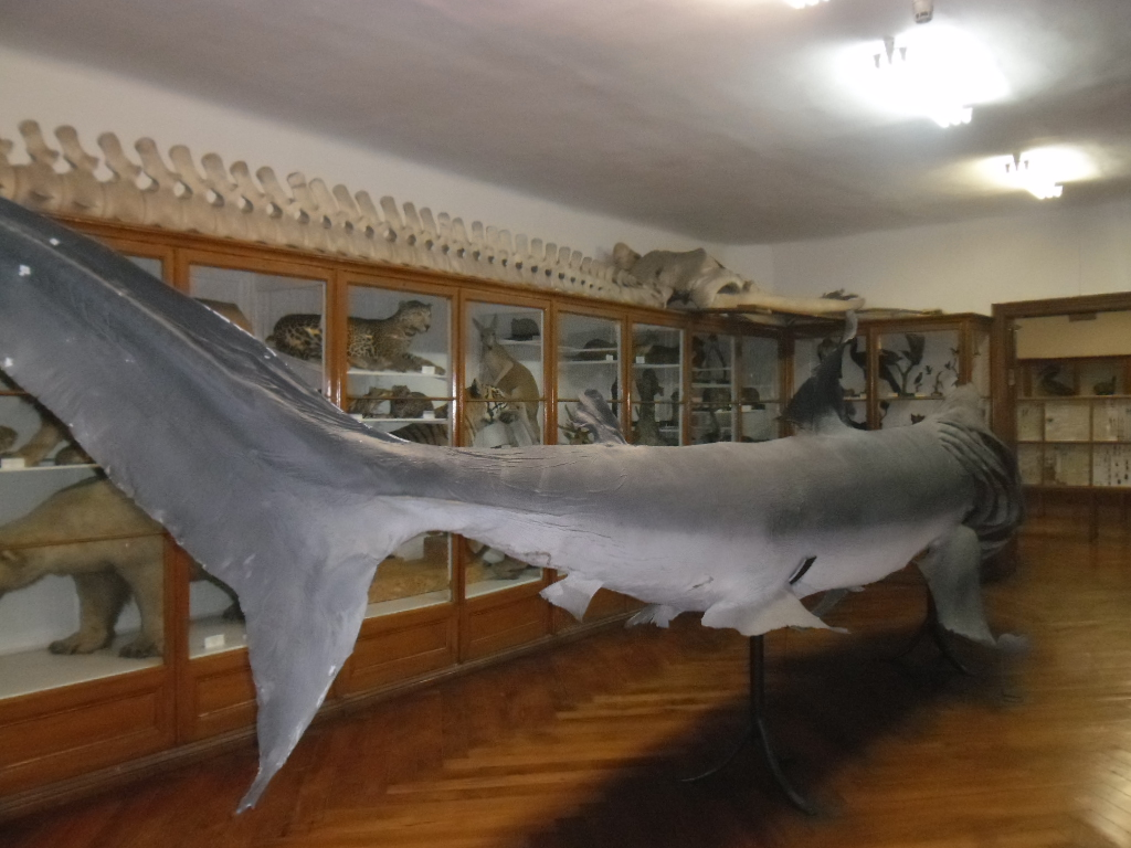 Prirodoslovni muzej u Zagrebu